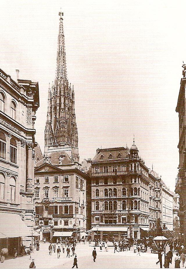 Wiener Stock im Eisen-Platz / The Stock im Eisen-Platz of Vienna